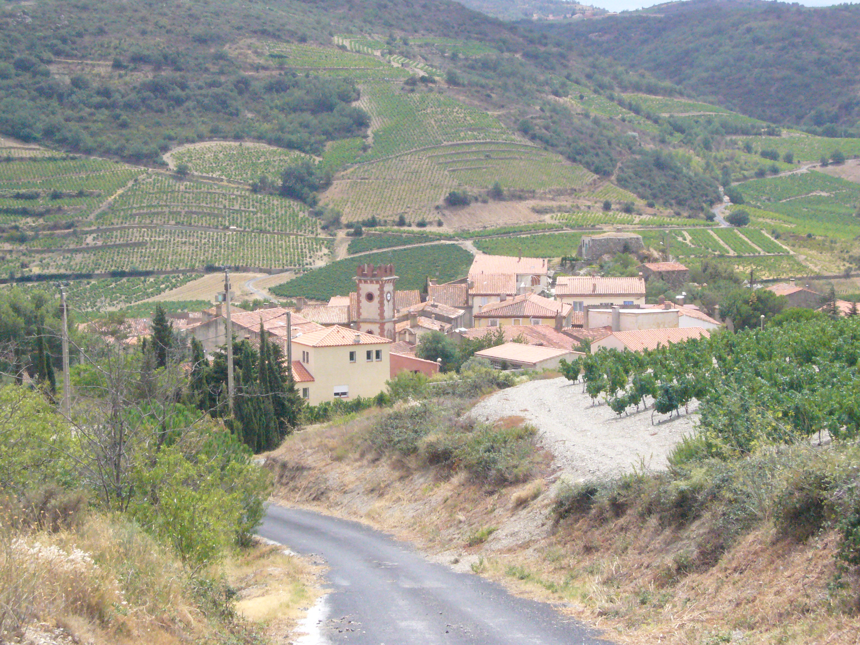 Le village de Planèzes (66, France)